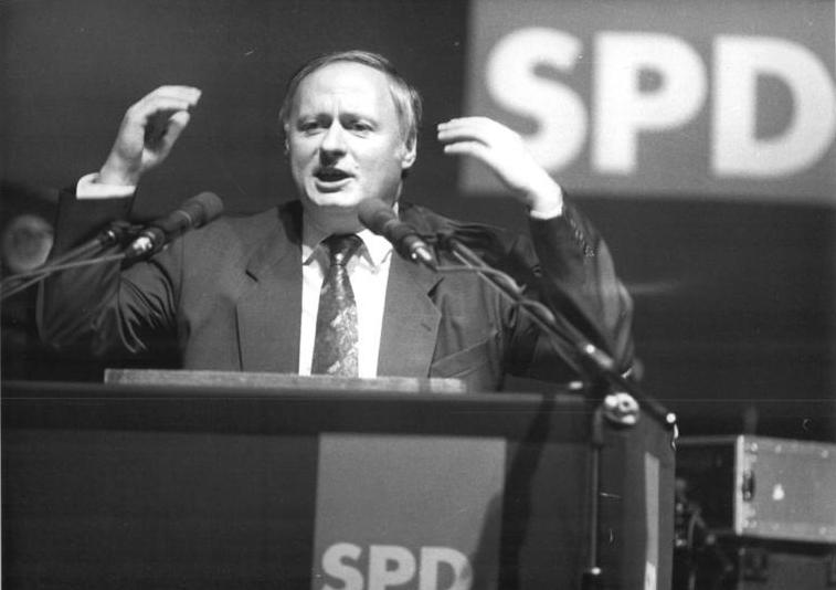 ADN-ZB-Gahlbeck-25.10.90 Dessau: Oskar Lafontaine, Kanzlerkandidat der SPD sprach auf einer Wahlveranstaltung seiner Partei in der Halle des Zementanlagenbaus Dessau.